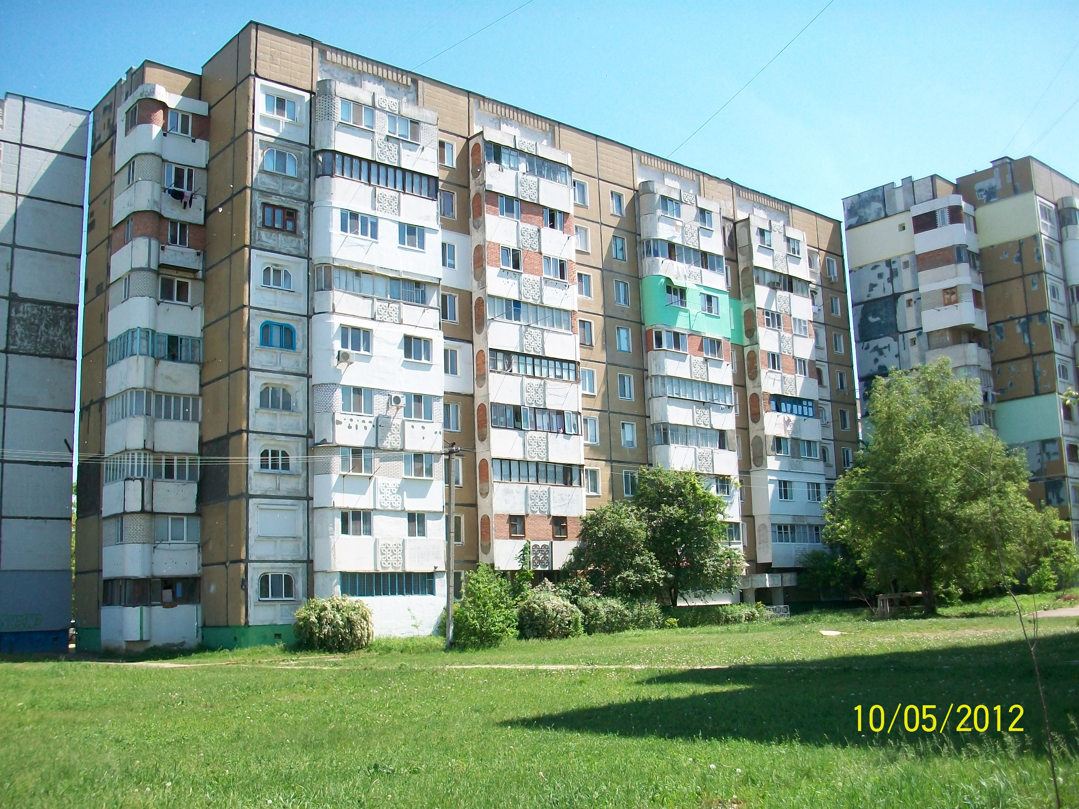 Bloc locativ din cartierul Dacia Bălți